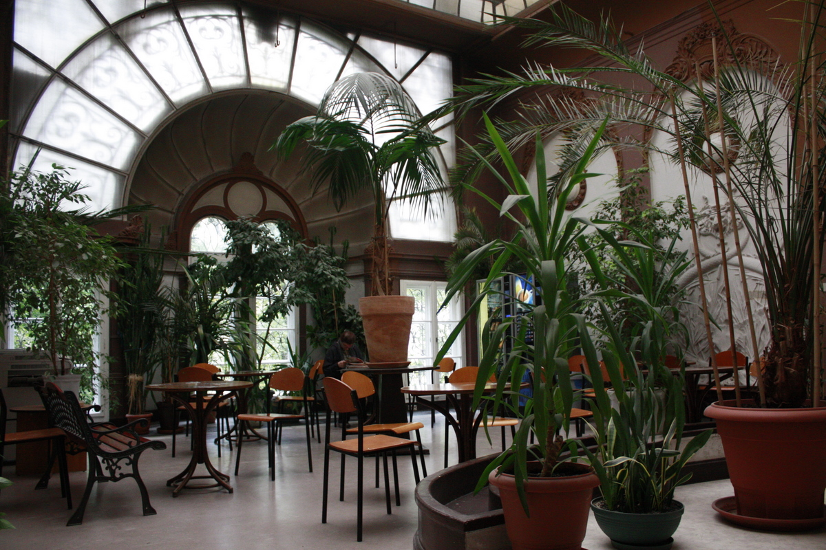 Łódź - Pałac Poznańskich, ob. Akademia Muzyczna